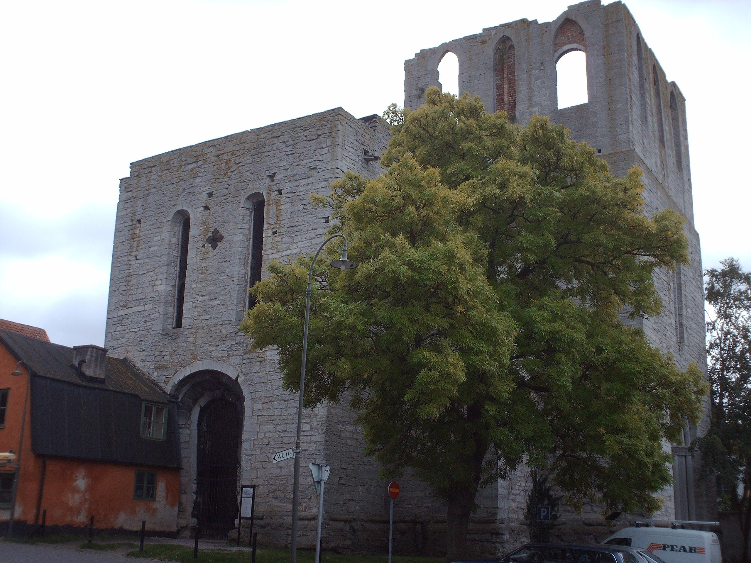 St Laurentius Church, Visby, Sweden